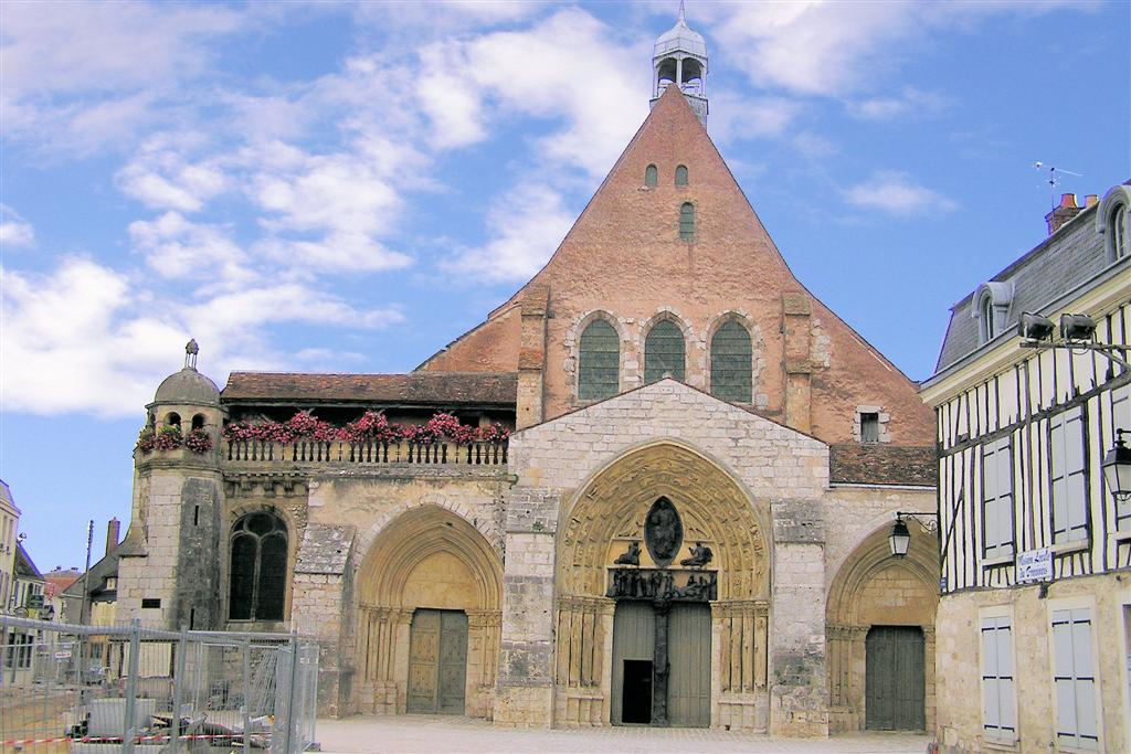 Église Saint-Ayoul de Provins.